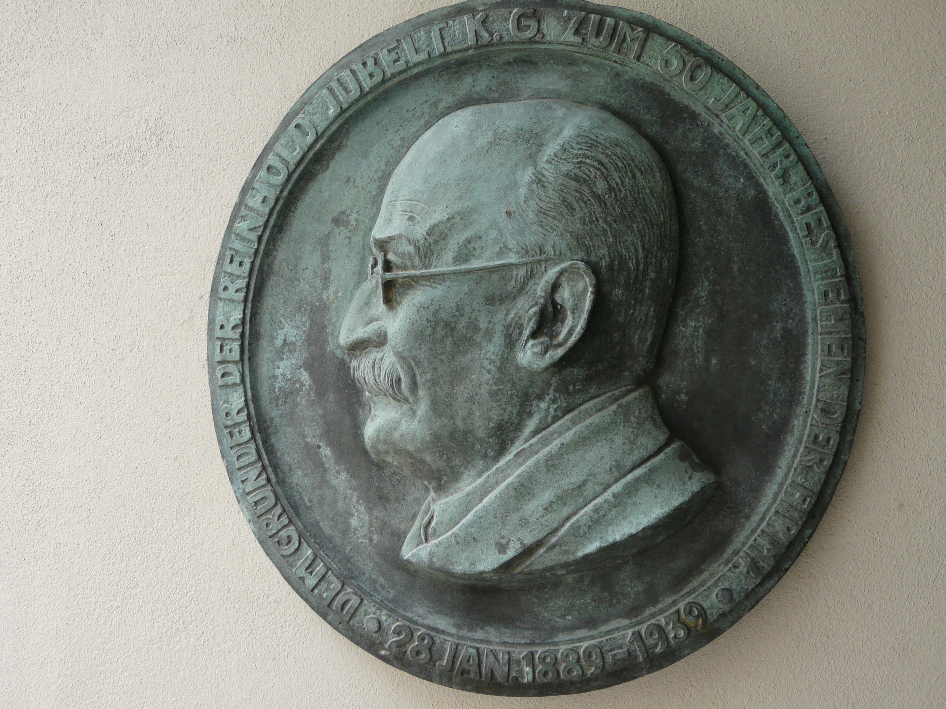 Reinhold Jubelt d. Ältere 04.10.1863 + 30.03.1934 Zeitungsverleger und Buchdruckereibesitzer Gründer und Herausgeber der Zeitzer Neuesten Nachrichten Begründer des Geschichts- und Altertumsvereins für Zeitz und Umgegend, Wegbereiter des Zeitzer Heimatmuseums Förderer des Rennsteigvereins, über 25 Jahre Rennewart